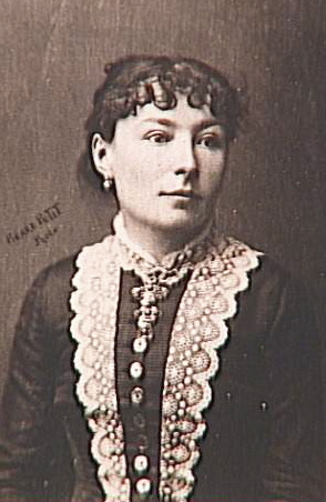 ArtistPhotographie réalisée par Pierre Petit (1831-1909)TitleVirginie Demont-BretonCurrent location Musée d'Orsay Native nameMusée d'OrsayLocationParisCoordinates48° 51′ 36″ N, 2° 19′ 37.2″ E Established1986Website control VIAF: 130307757 LCCN: n84128587 GND: 006672892 BnF: cb11990767x ULAN: 500310001 WorldCat Source/PhotographerRéunion des musées nationaux This image (or other media file) is in the public domain because its copyright has expired. This applies to Australia, the European Union and those countries with a copyright term of life of the author plus 70 years. You must also include a United States public domain tag to indicate why this work is in the public domain in the United States. Note that a few countries have copyright terms longer than 70 years: Mexico has 100 years, Colombia has 80 years, and Guatemala and Samoa have 75 years, Russia has 74 years for some authors. This image may not be in the public domain in these countries, which moreover do not implement the rule of the shorter term. Côte d'Ivoire has a general copyright term of 99 years and Honduras has 75 years, but they do implement the rule of the shorter term. This file has been identified as being free of known restrictions under copyright law, including all related and neighboring rights.